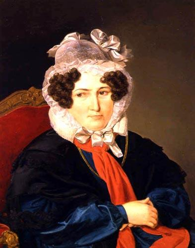 Sophie Friederike Gräfin von Mensdorff-Pouilly (* 1778; † 1835), geb. Prinzessin von Sachsen-Coburg-Gotha-Saalfeld, Herzogin zu Sachsen, Ehefrau von Emanuel Graf von Mensdorff-Pouilly (* 1777; † 1852), kaiserlich-königlicher General der Cavallerie, Tochter des Herzogs Franz von Sachsen-Coburg-Saalfeld, Herzog zu Sachsen